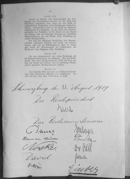 Das deutsche Reichsarchiv ! Die Schluss-Seite der deutschen Reichsverfassung vom 11. August 1919 mit der Unterschrift des ersten deutschen Reichspräsidenten Ebert und den Mitgliedern des ersten Reichsministeriums nach der Revolution.